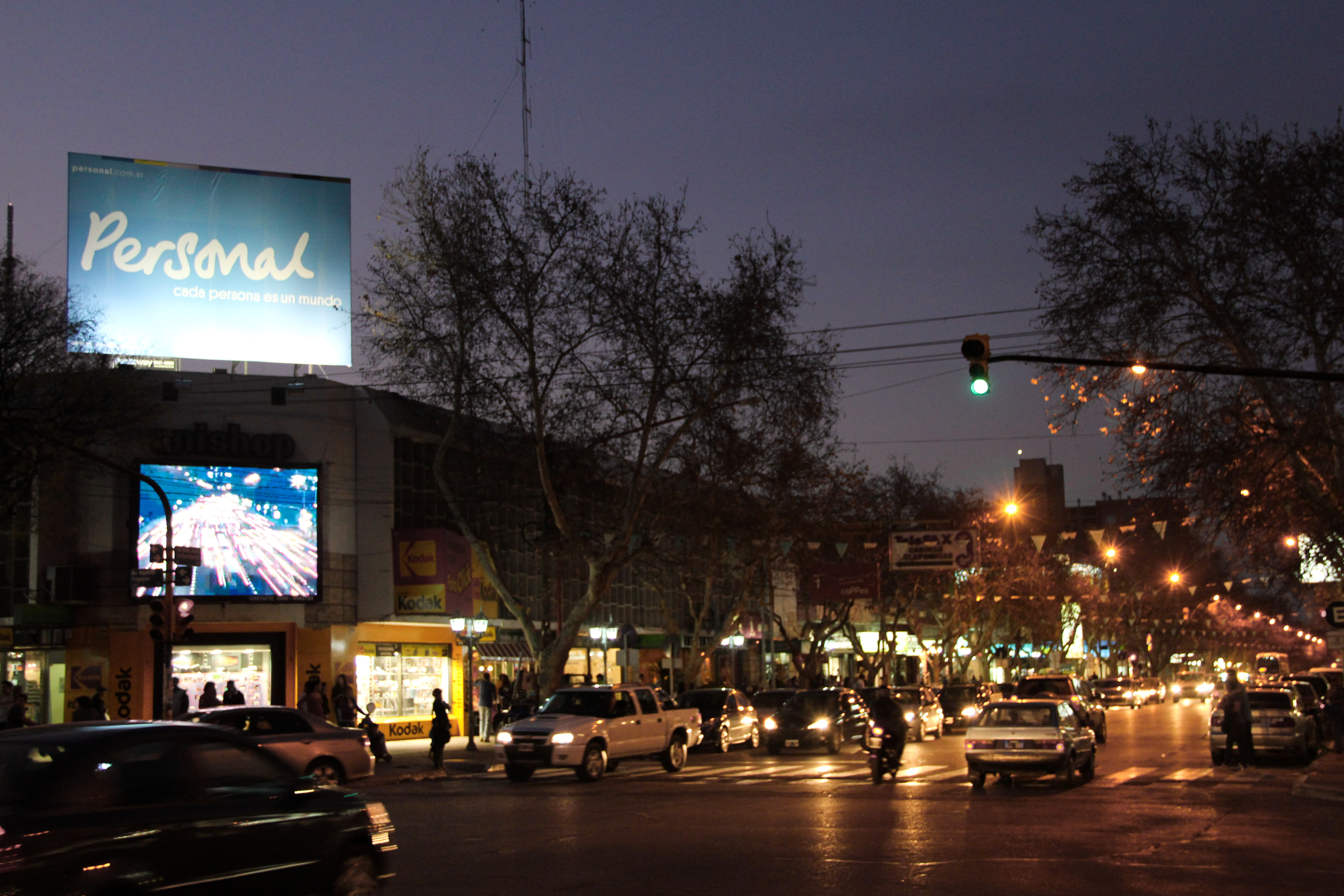 El centro de la ciudad de San Rafael en una noche de invierno.